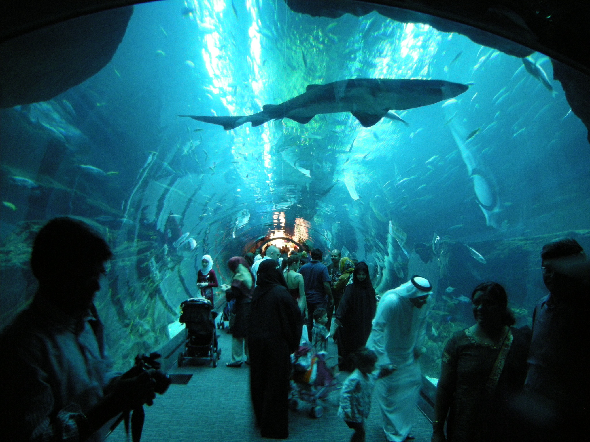 ... dentro do Dubai Mall